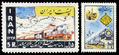 تمبر افتتاح ریلراه تهران-مشهد ۱۳۳۶